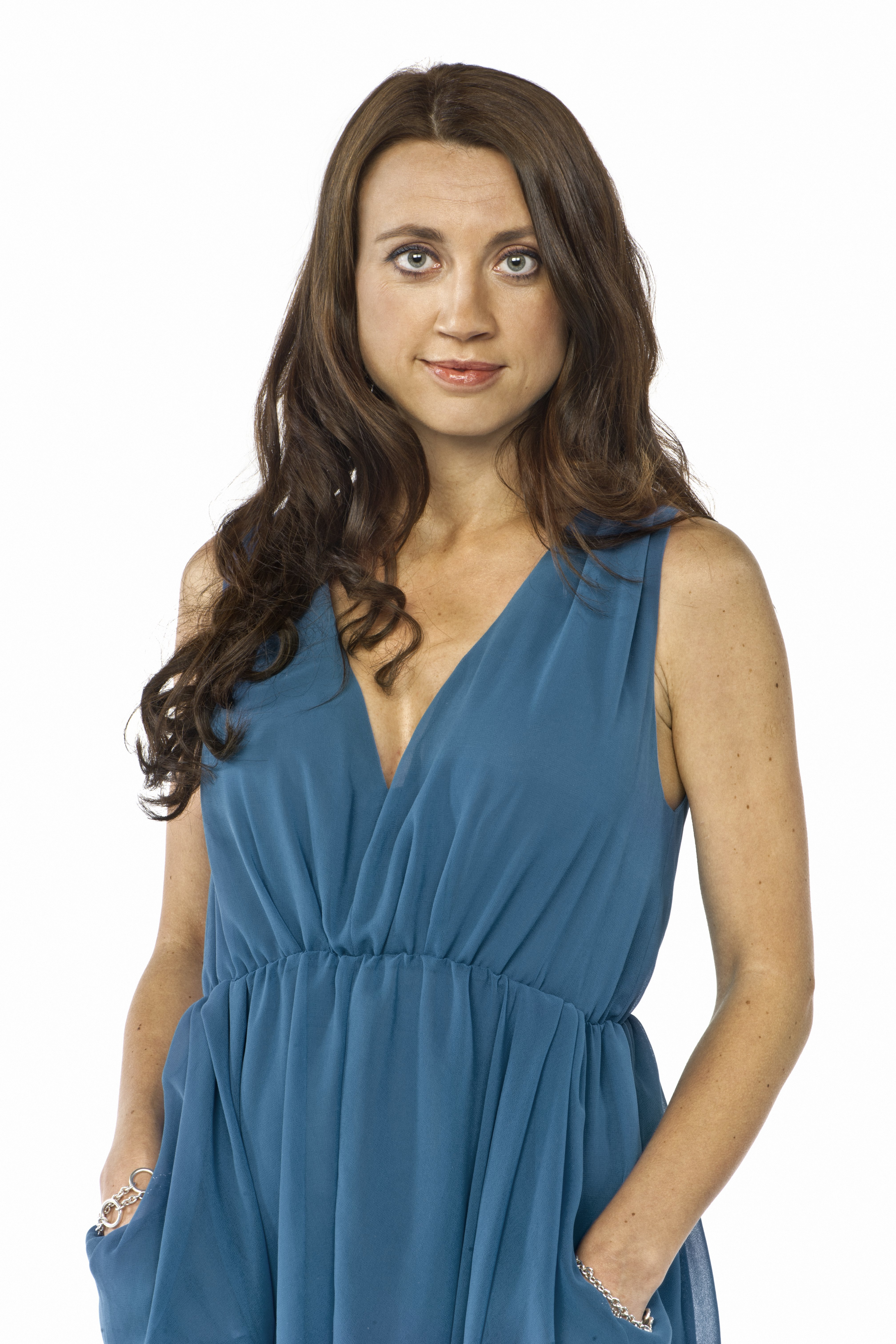 Camilla Läckberg är Barncancerfondens nya ambassadör.